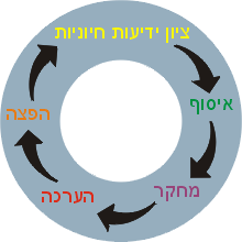 תרשים המתאר את מעגל המודיעין. אני יצרתי.